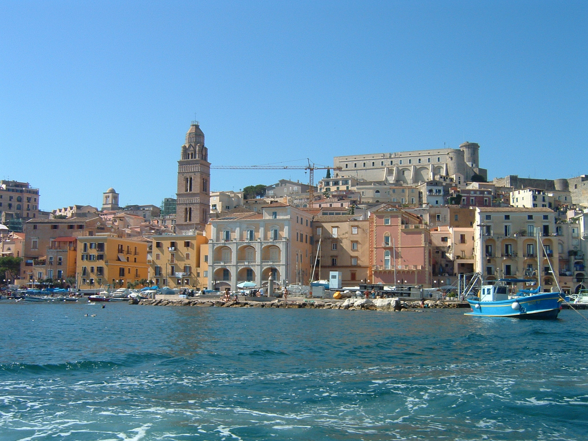 Gaeta medievale vista da mare (Langella Michele)